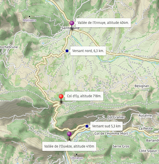 Carte avec marqueurs pour localiser le col d'Ey This map may be incomplete, and may contain errors. Don't rely solely on it for navigation.